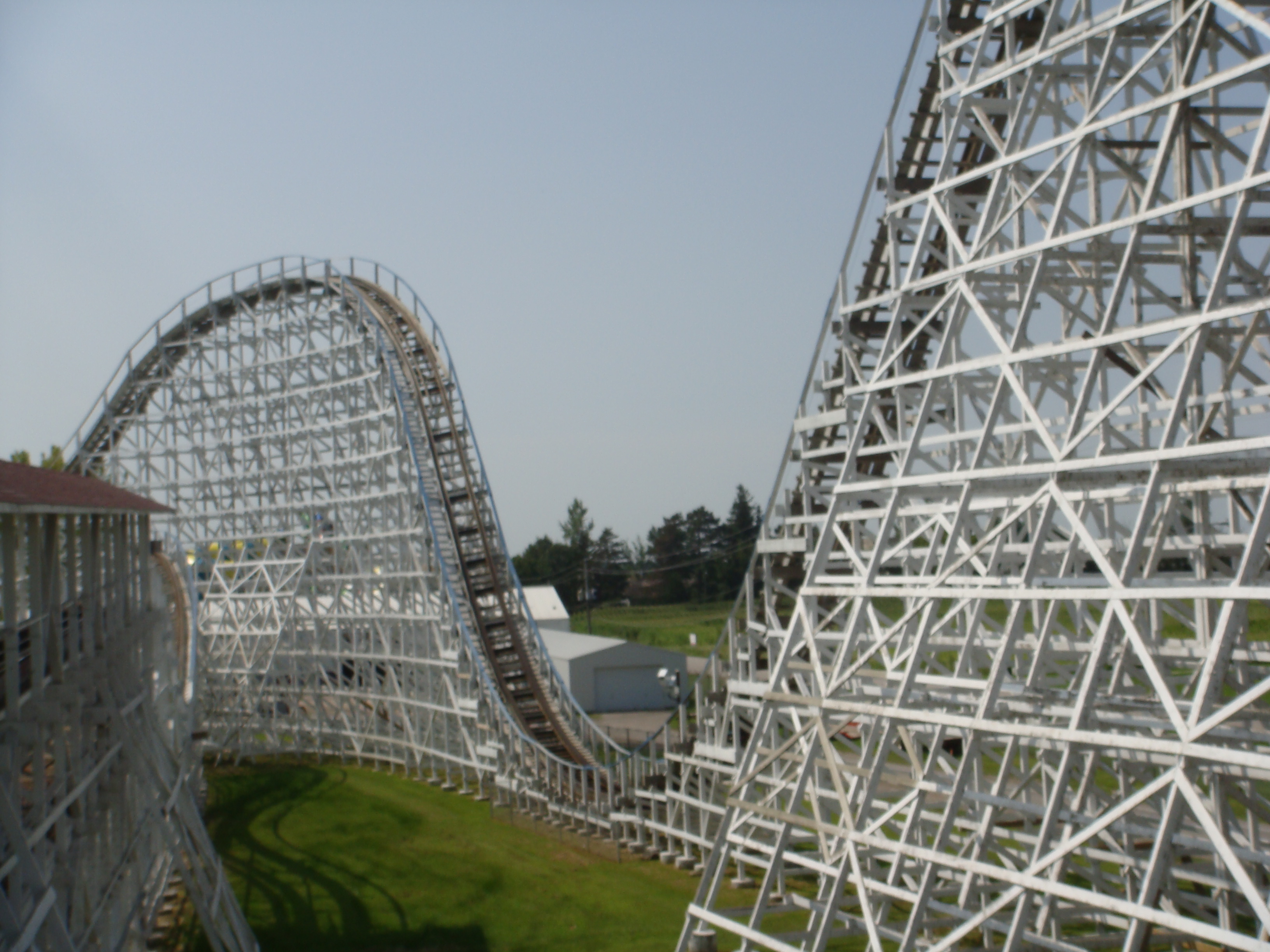 First drop